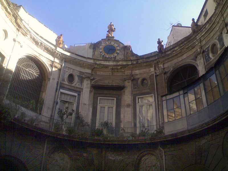 Palazzo Spinelli di Laurino (Napoli)